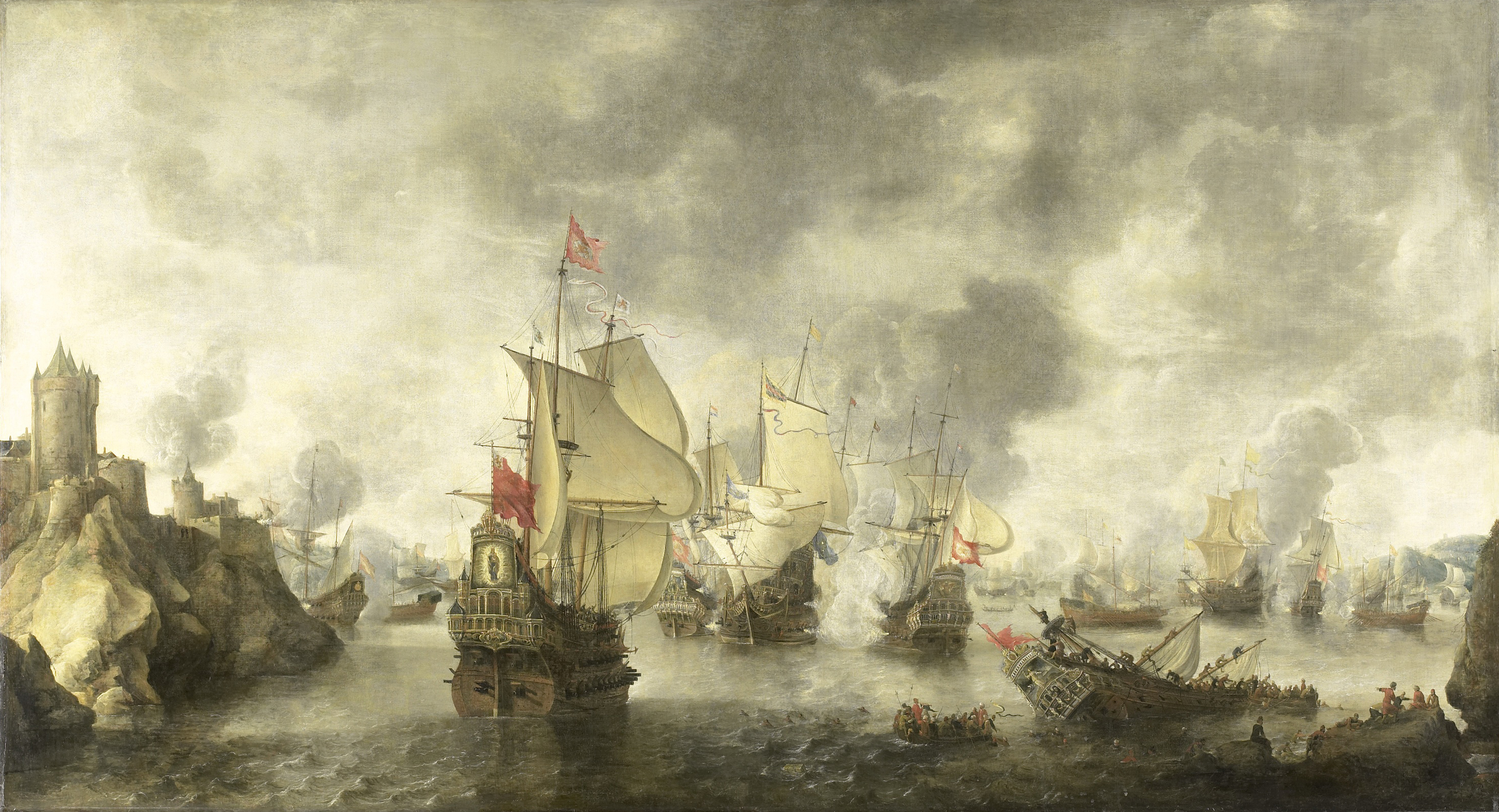 Zeeslag van de verenigde Venetiaanse en Nederlandse vloten onder bevel van Giacomo Riva tegen de Turken in de Baai van Foja, 1649. Links de gewapende Nederlandse koopvaarder 'Madonna della Vigna'.